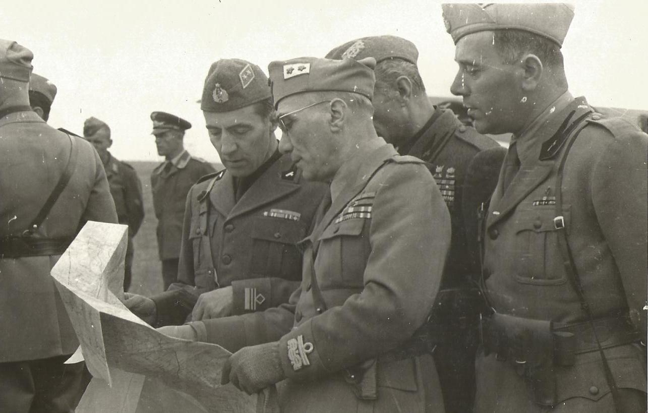 gen. Malaguti con ufficiali Italiani - Russia 1942